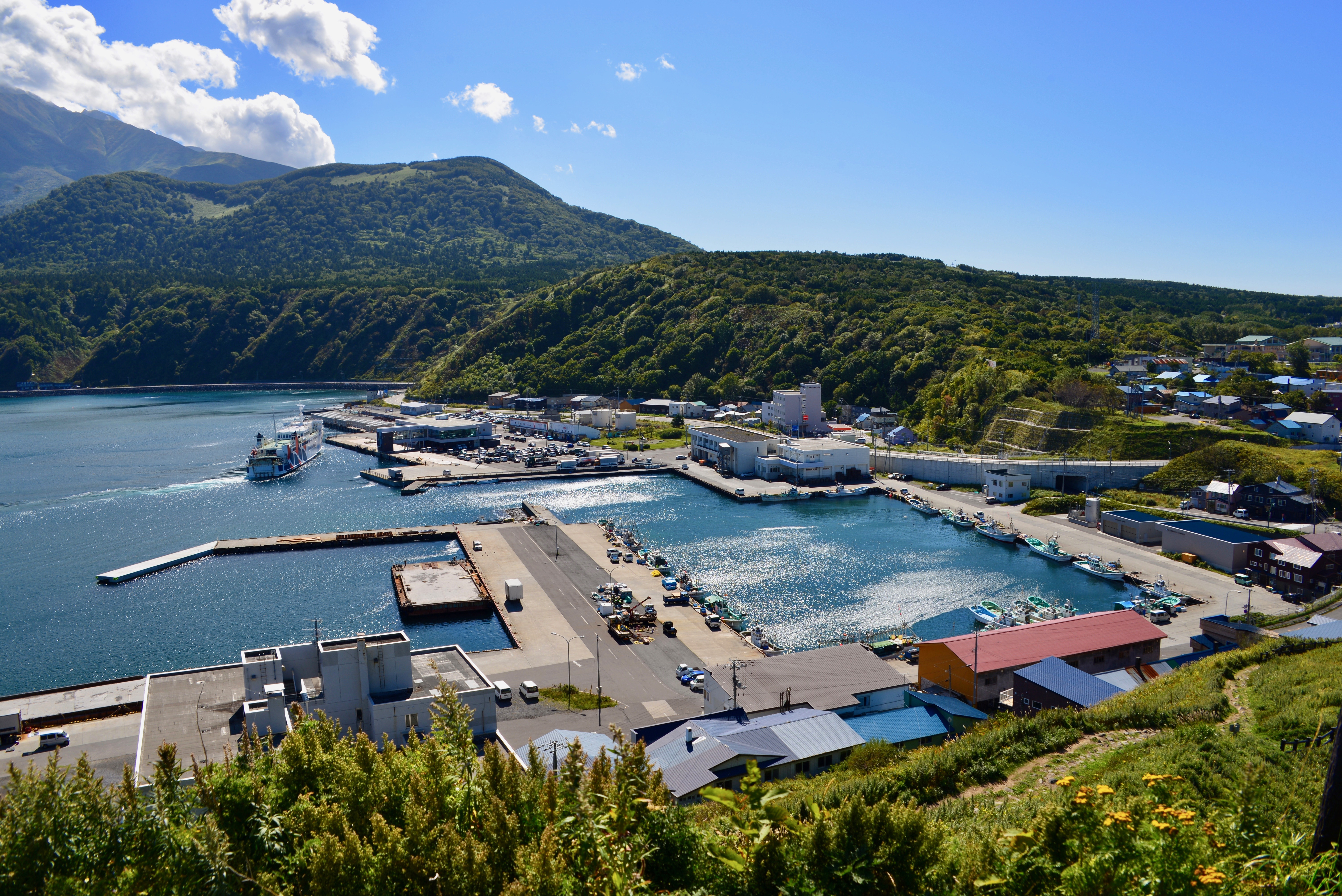 利尻島鴛泊港 ペシ岬より撮影